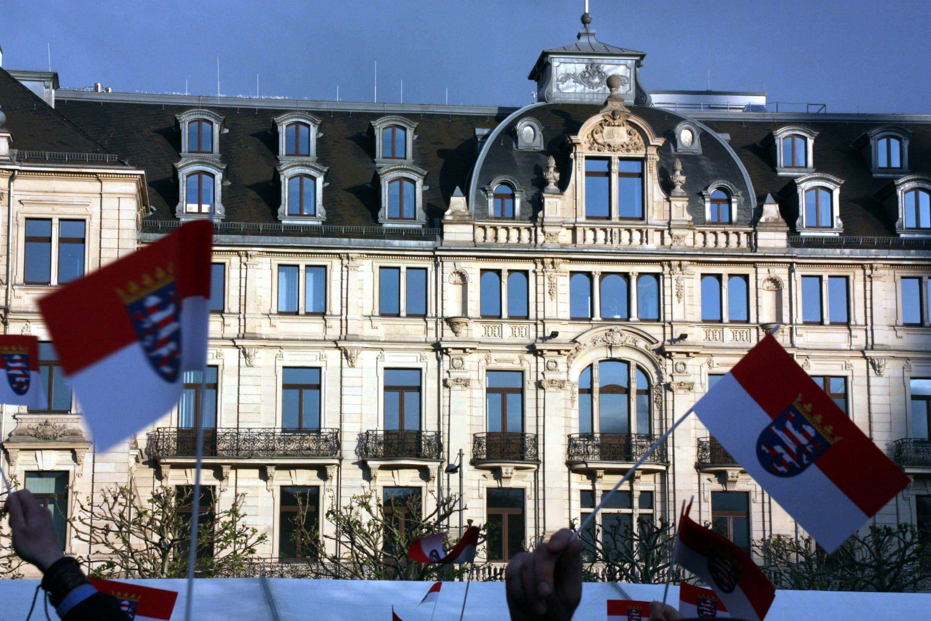 Feiernde Hessen schwenken Mini-Landesdienstflaggen vor der hessischen Staatskanzlei in Wiesbaden. Aufgenommen anlässlich eines Auftritts der Rodgau Monotones auf dem Kranzplatzfest 2013